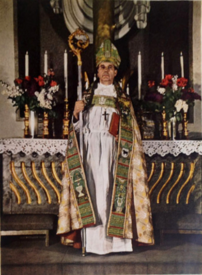 Arvid Runestam, biskop i Karlstad 1938-57.